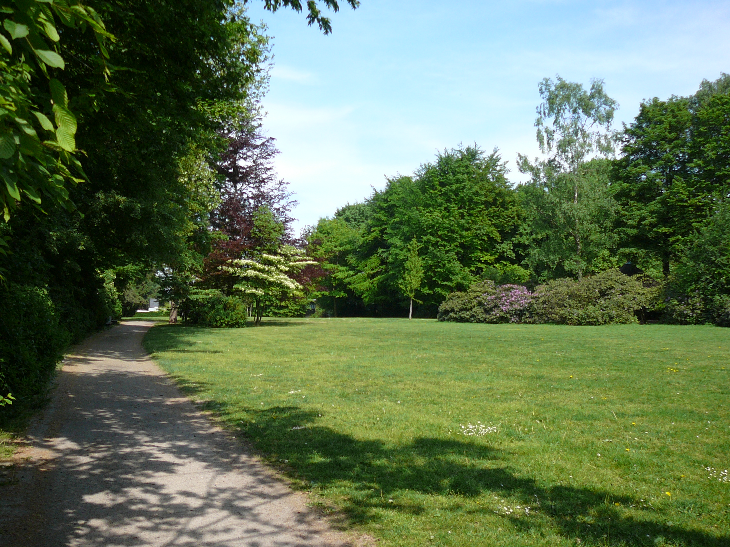 Von-der-Heydt-Park, Wuppertal